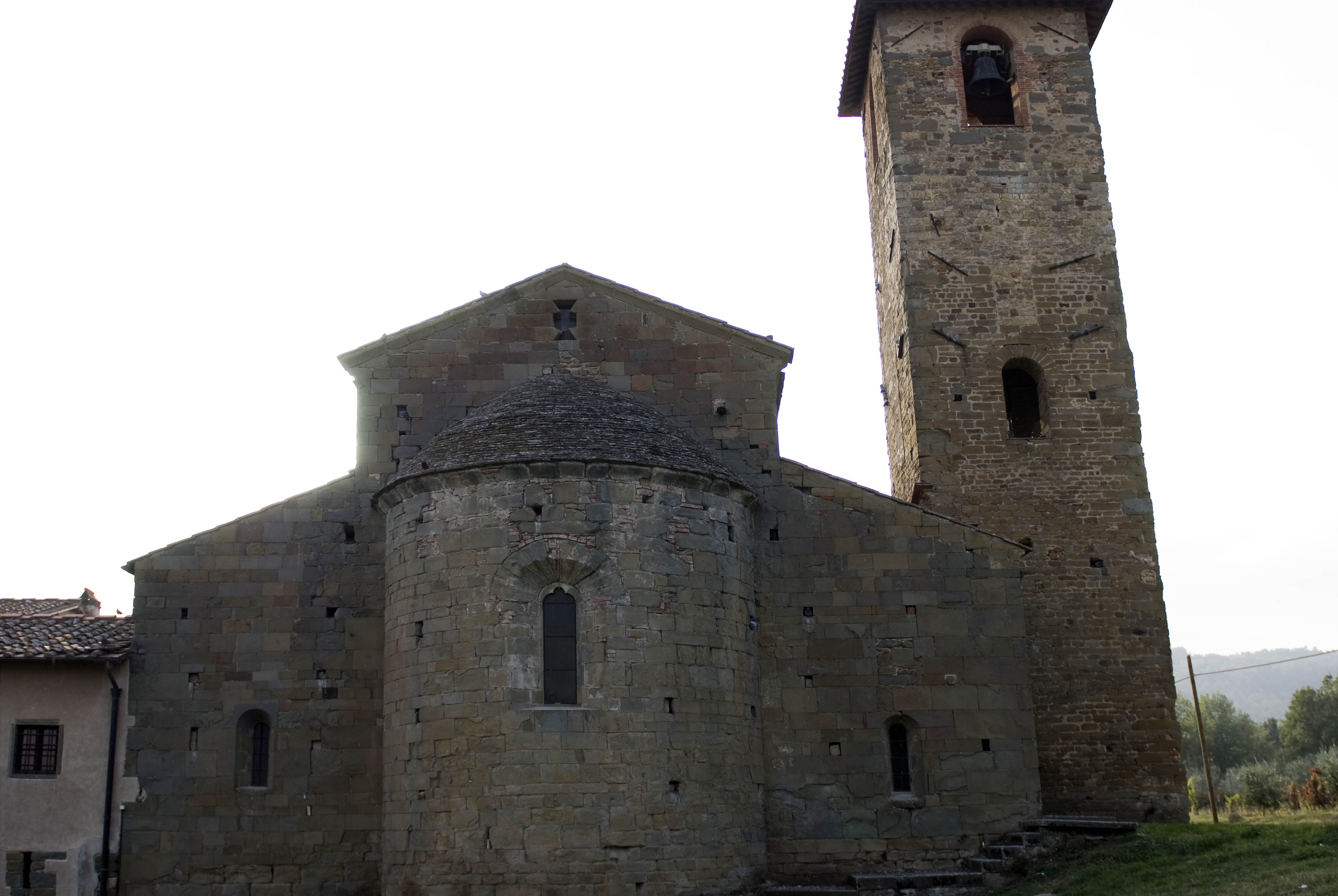 Abside della pieve di San Romolo a Gaville (Figline Valdarno)